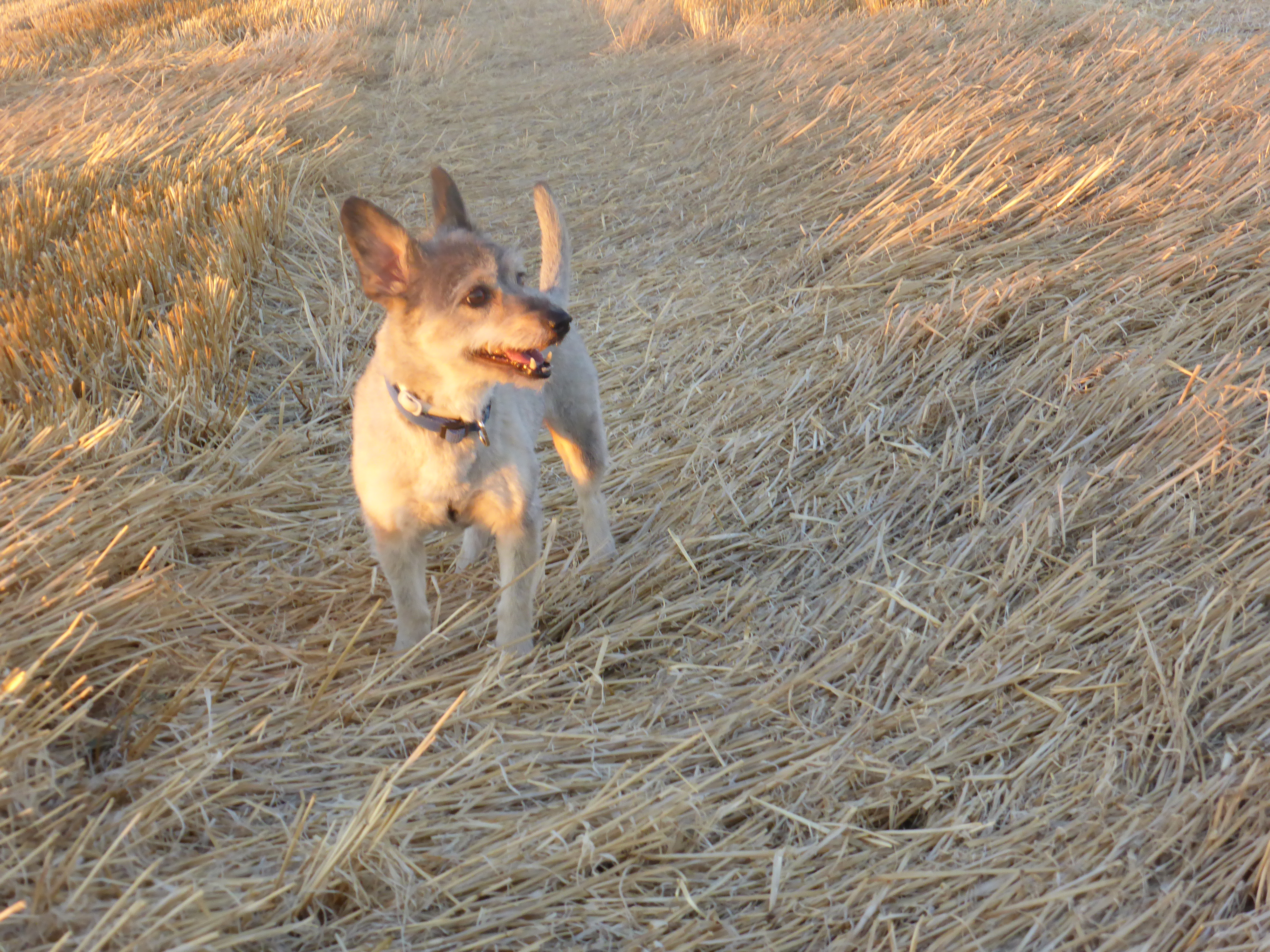 En la isla de El Hierro existen perros de aspecto lobuno, que tradicionalmente eran empleados en el pastoreo de cabras y ovejas. En la foto vemos una lobita herreña, no estándar (aunque con muchas de las características del proyecto de patrón racial), procedente del Pozo de la Salud (Sabinosa, Frontera, El Hierro), nacida en 2005. En la foto de 2013 está con 9 años, viviendo en la Península, en Madrid. En la foto aparece con el pelo cortado en una peluquería canina, y por eso parece más blanca, viéndose el subpelo muy denso.